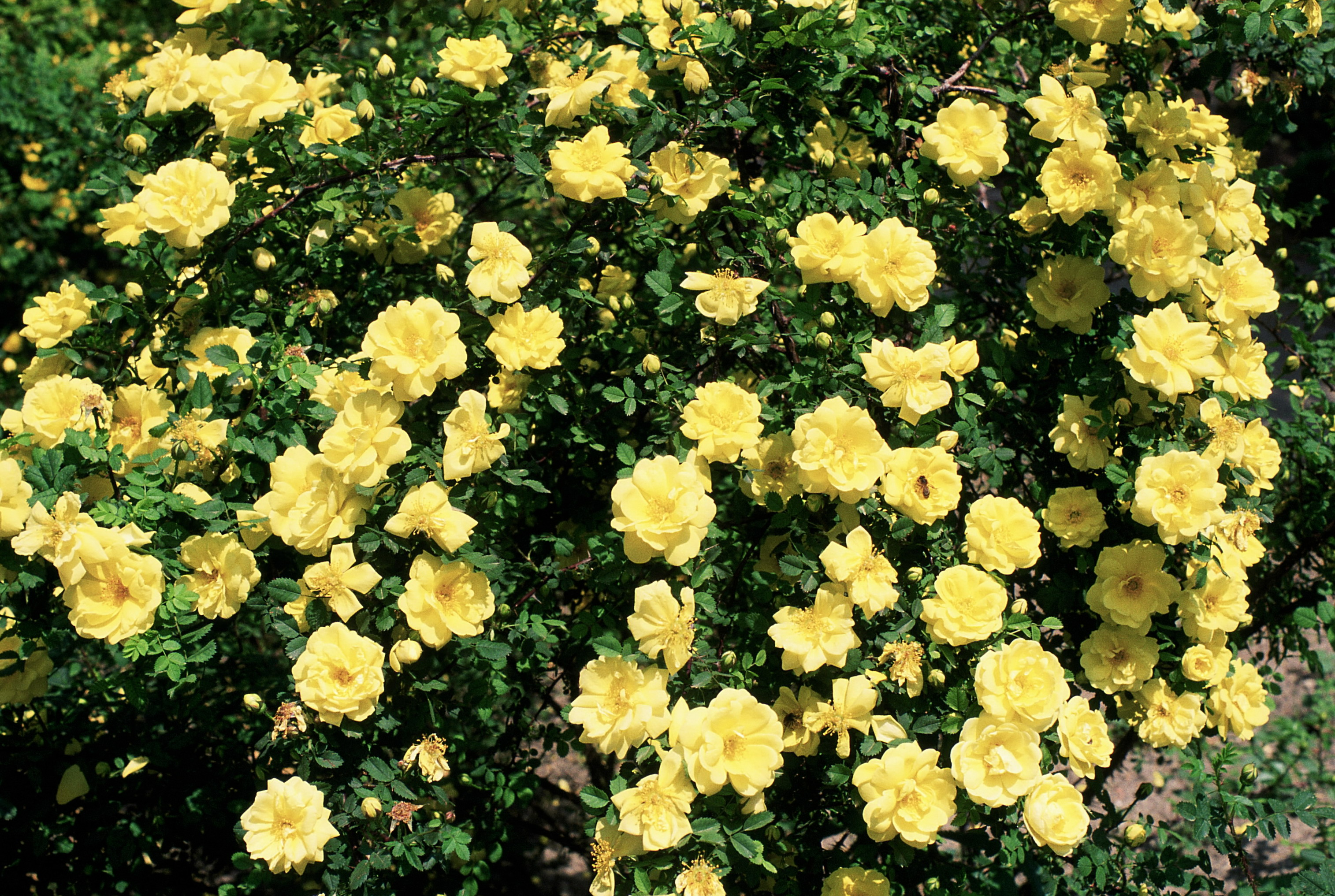 Rosa 'Harison's Yellow', sect. Pimpinellifoliae. Real Jardín Botánico, Madrid